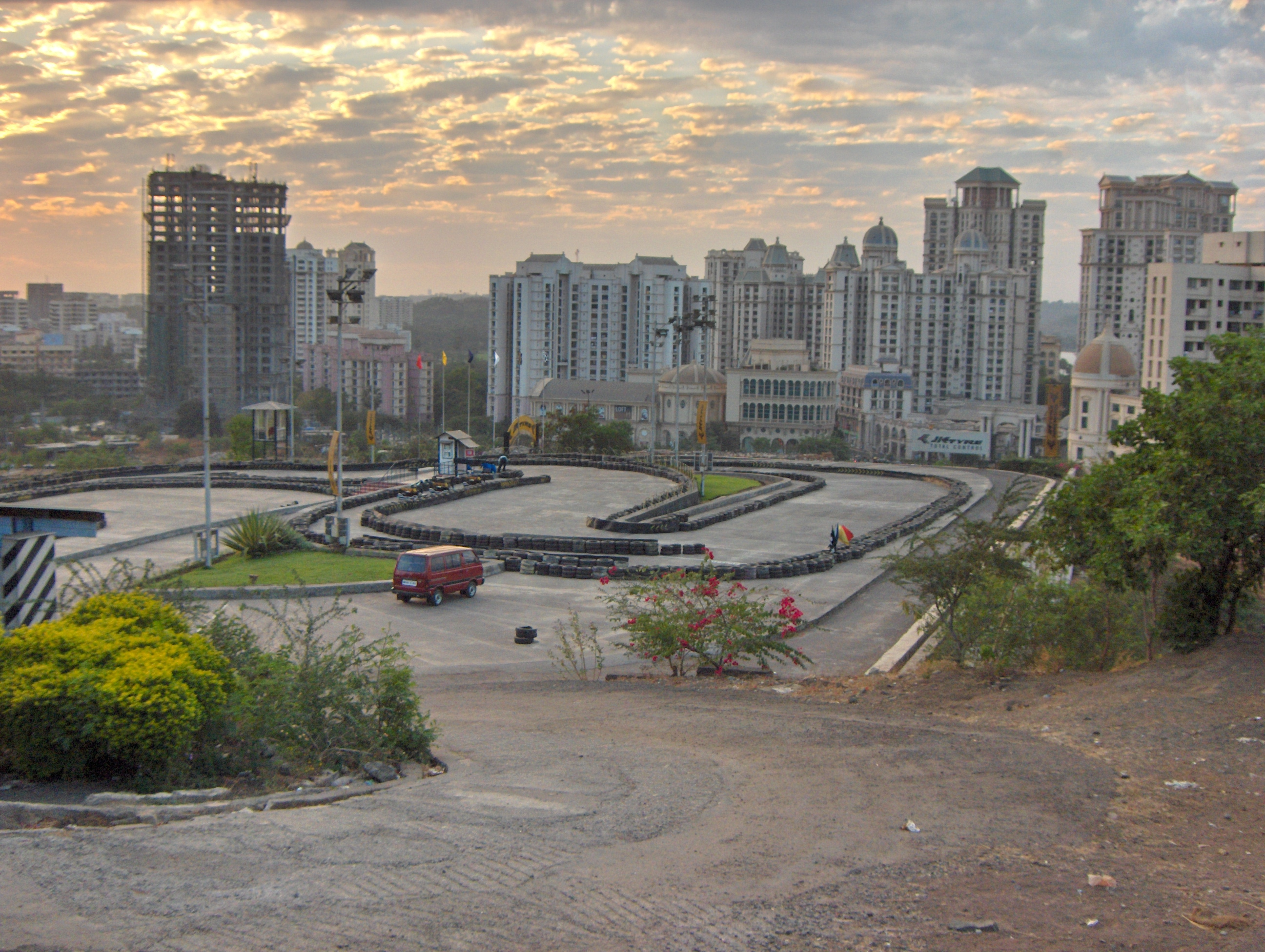 Hiranandani Gardens in Mumbai Image taken by me, Nichalp on 9-Mar-06